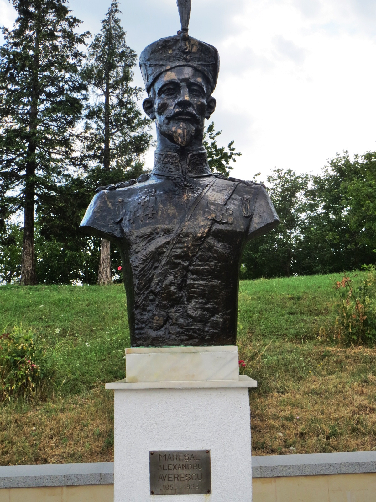 Se află în incinta Mausoleului.